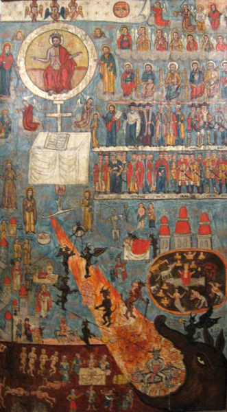 Cтрашный суд, православная икона 18 века